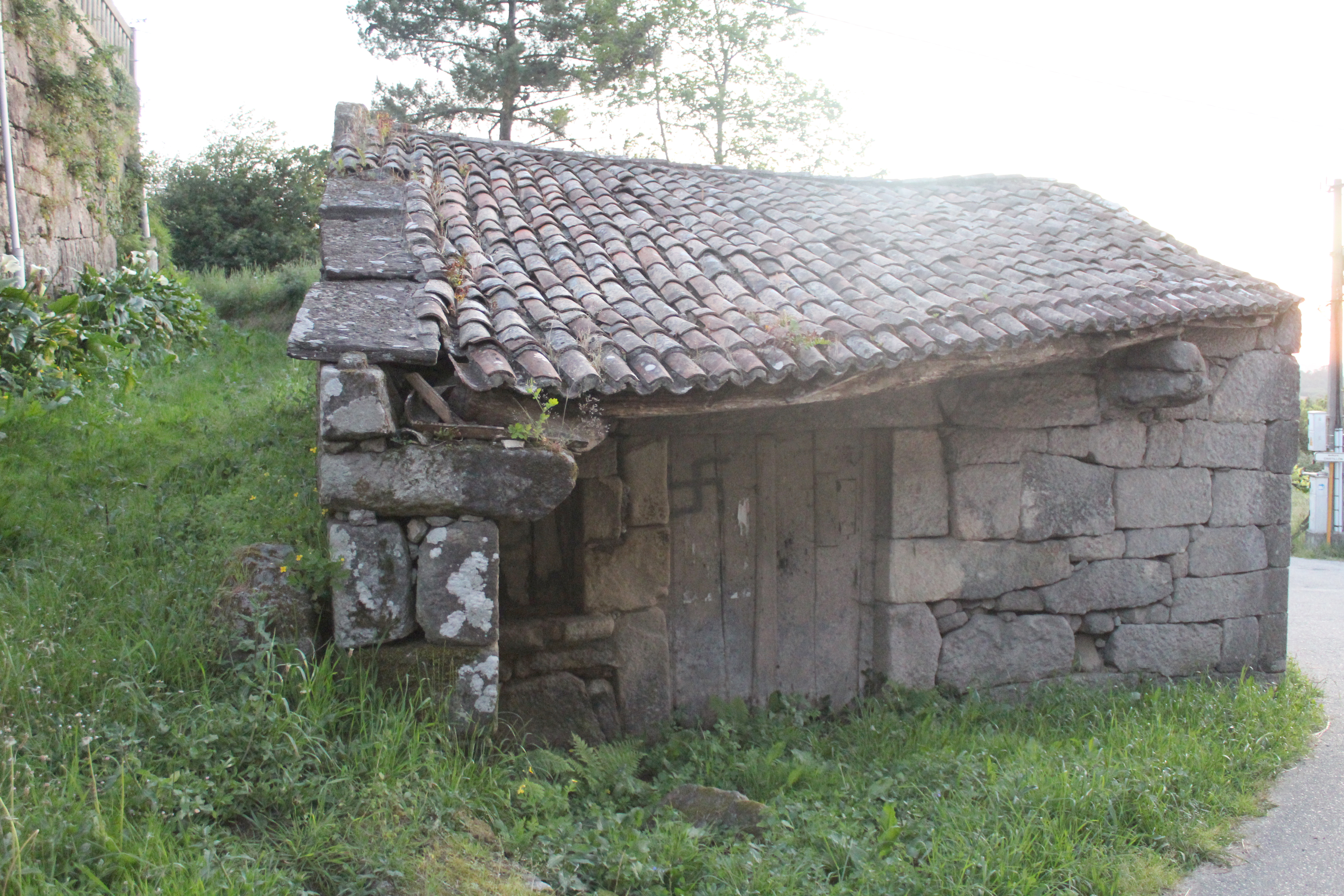 Parroquia de Mañufe, Gondomar